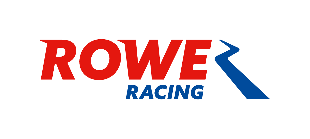 neues ROWE RACING Logo